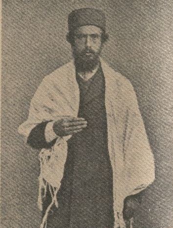 שמואל יבנאלי, 1911 רישיון נוצר על ידי משתמש:Mort